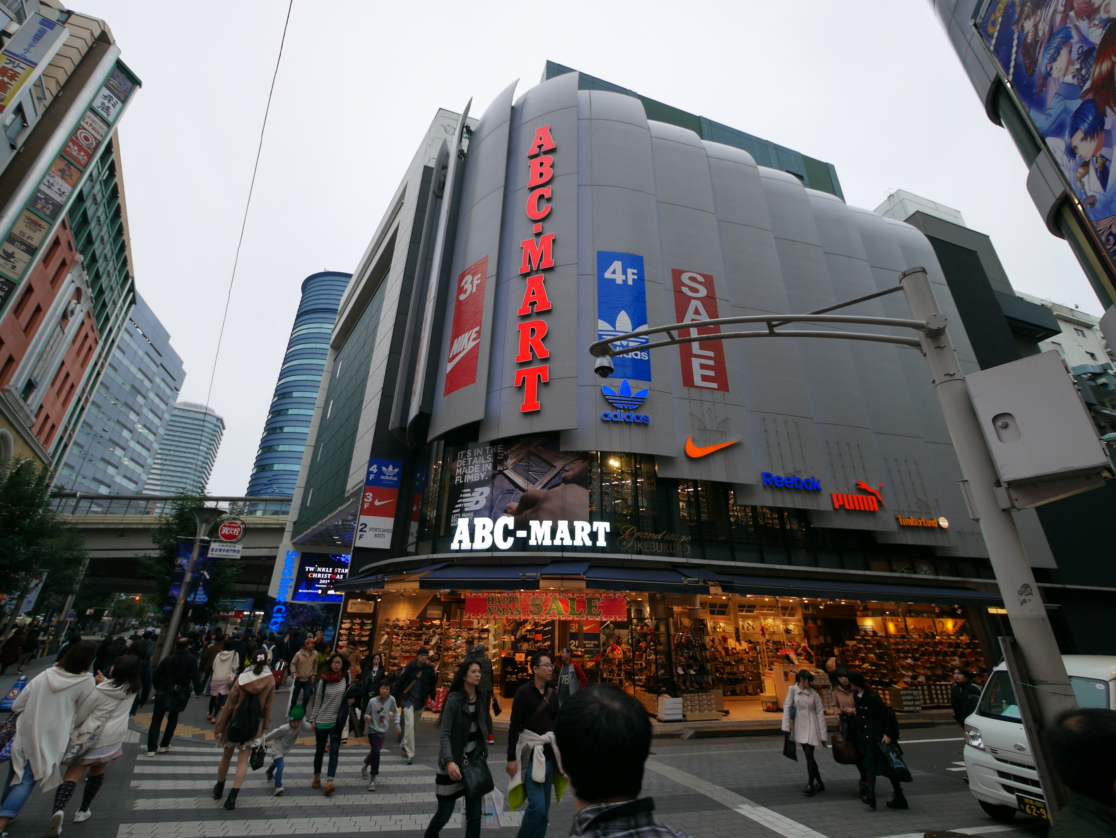 1 Chome Nishiikebukuro, Toshima-ku, Tōkyō-to 171-0021, Japan